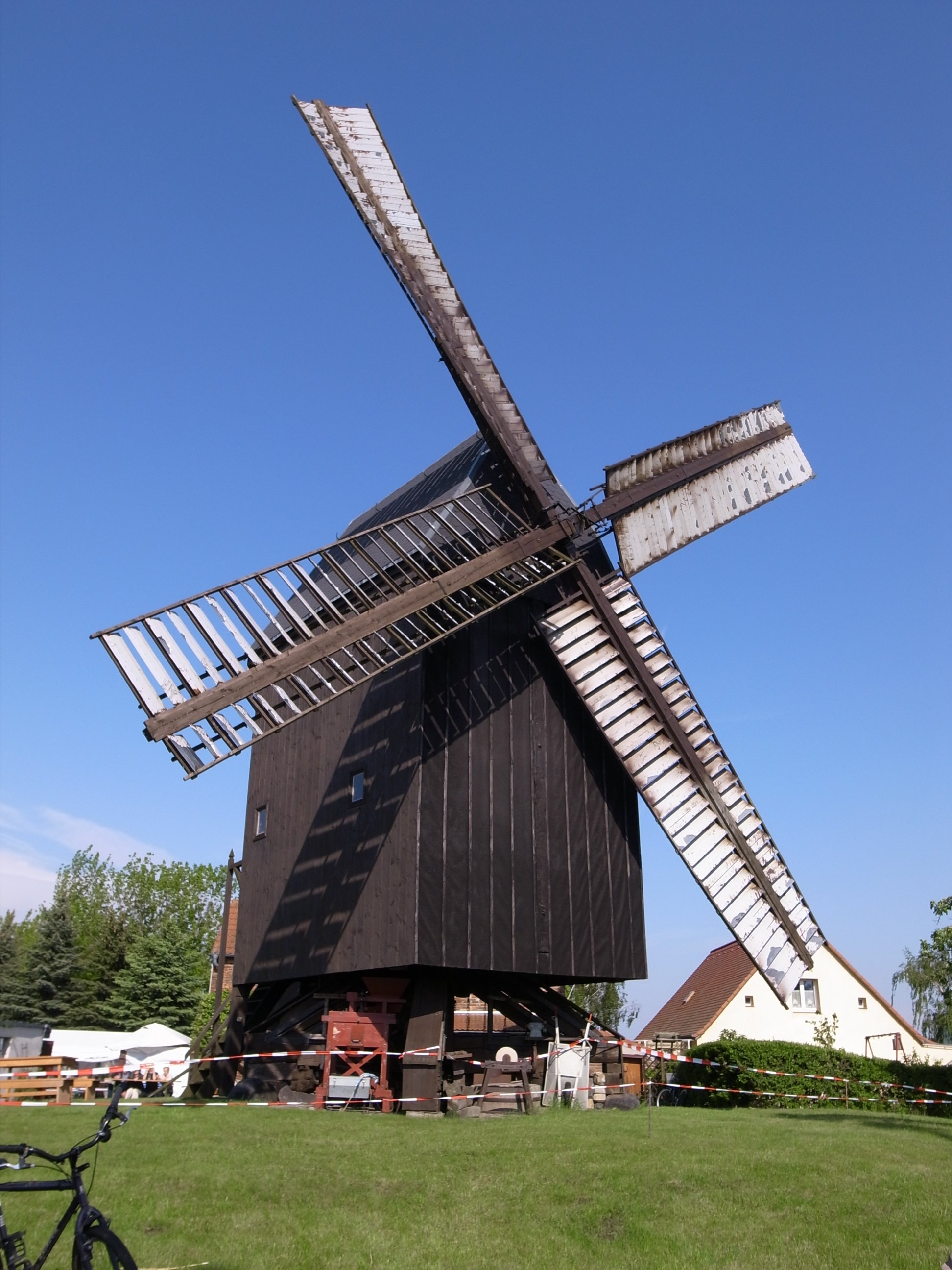 Sachsendorf, Windmühle, weitere Informationen: Deutsche Gesellschaft für Mühlenkunde und Mühlenerhaltung (DGM) e.V.